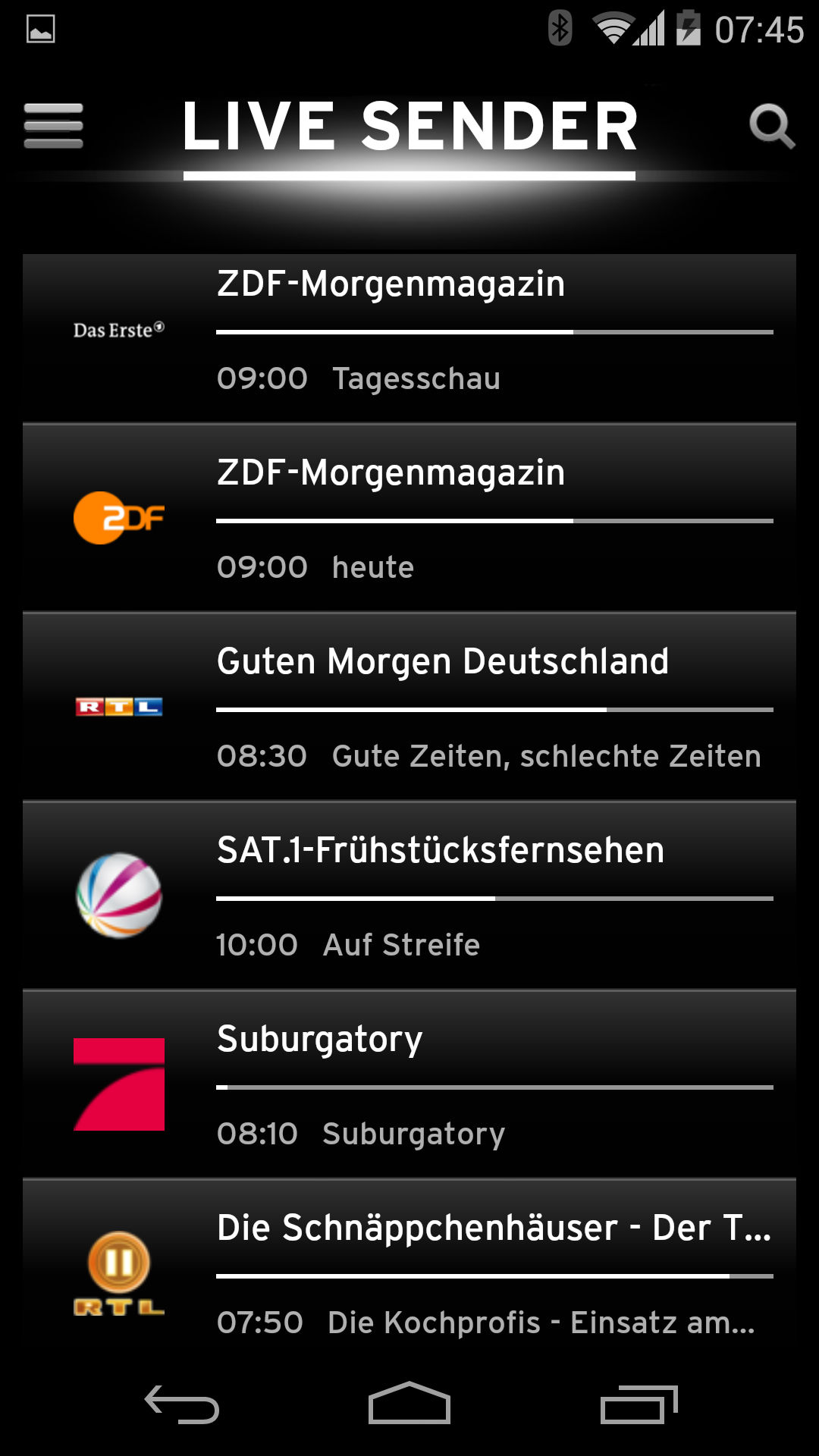 Screenshot von Horizon Go 2.1.2 unter Android 4.4.4